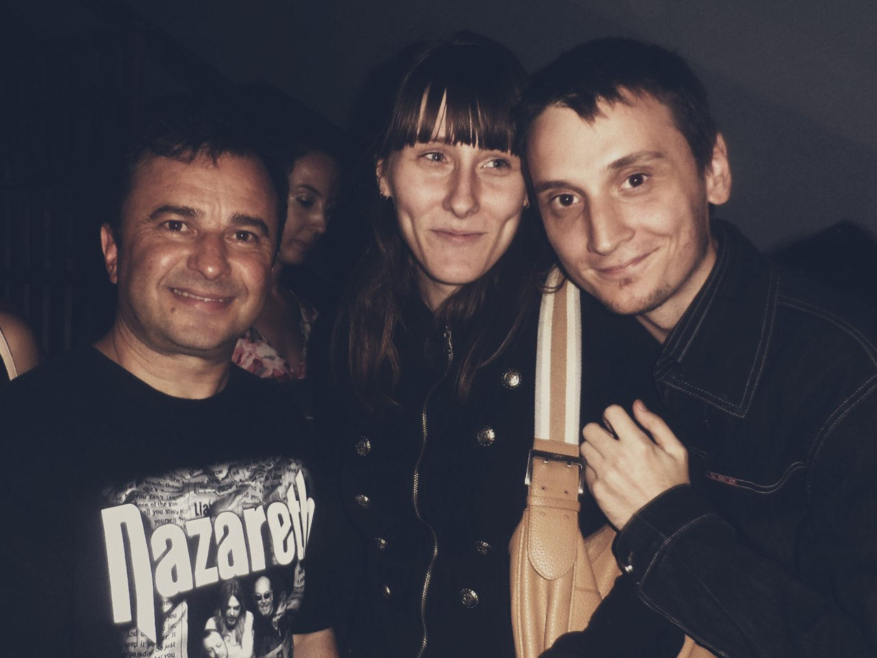 Мелитополь